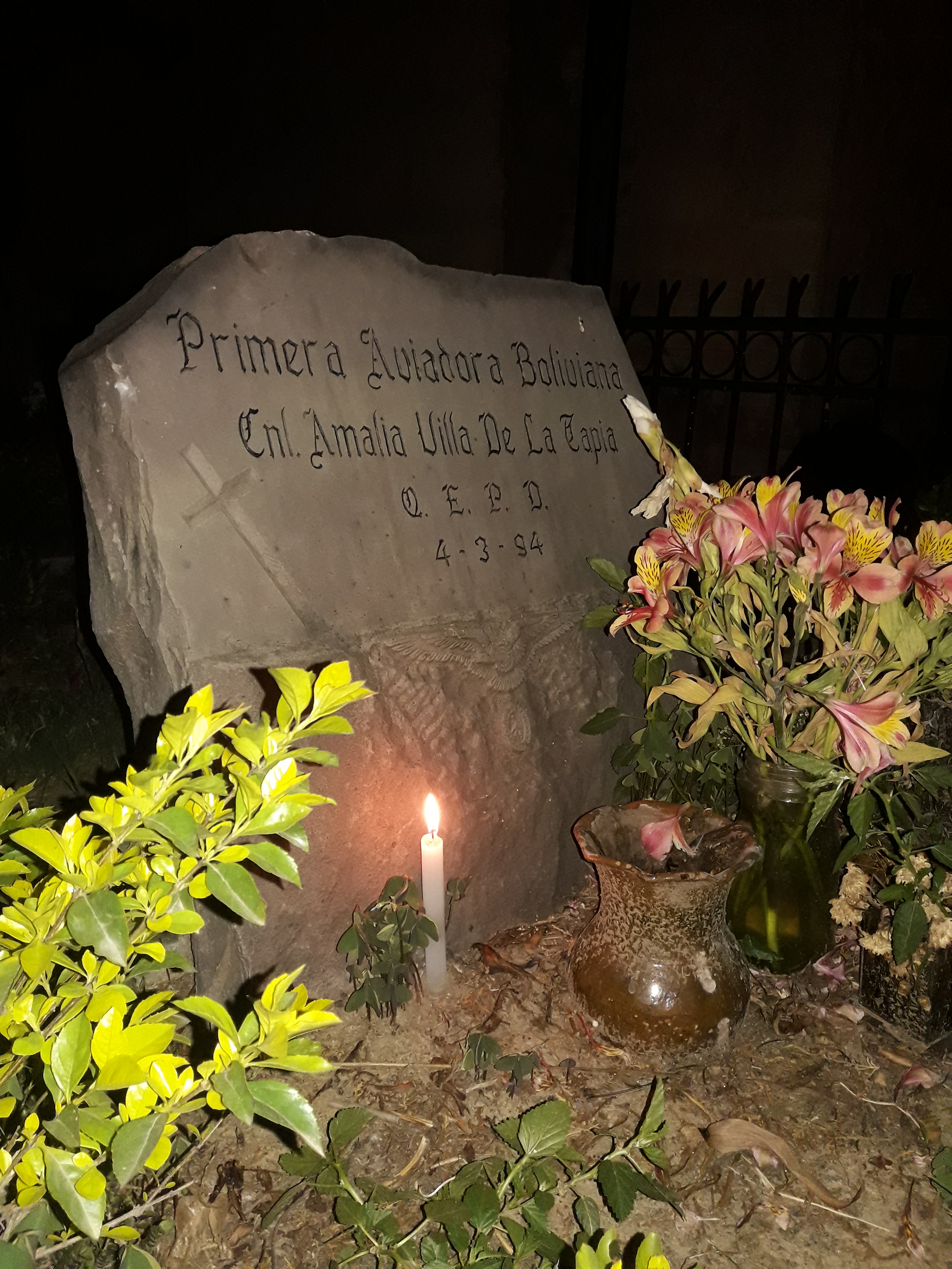 Amalia Villa de la Tapia, la primera aviadora boliviana